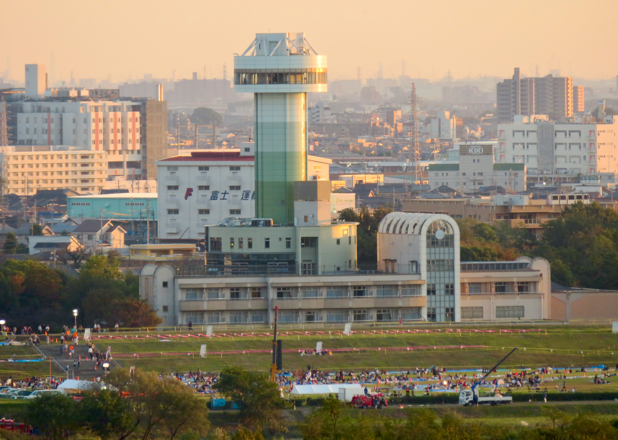 岐阜県各務原市の仏眼院から撮影した「すいとぴあ江南」。この日は江南市民花火大会が開催されるため、建物前の江南緑地公園に沢山の人がいました。